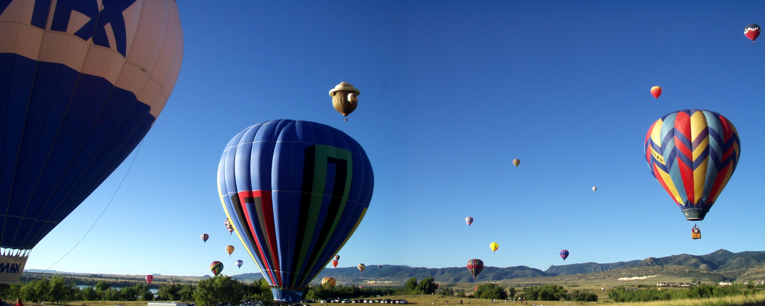 Ballonausflug: „Erlebnis bei den aufsteigenden Ballonen.“